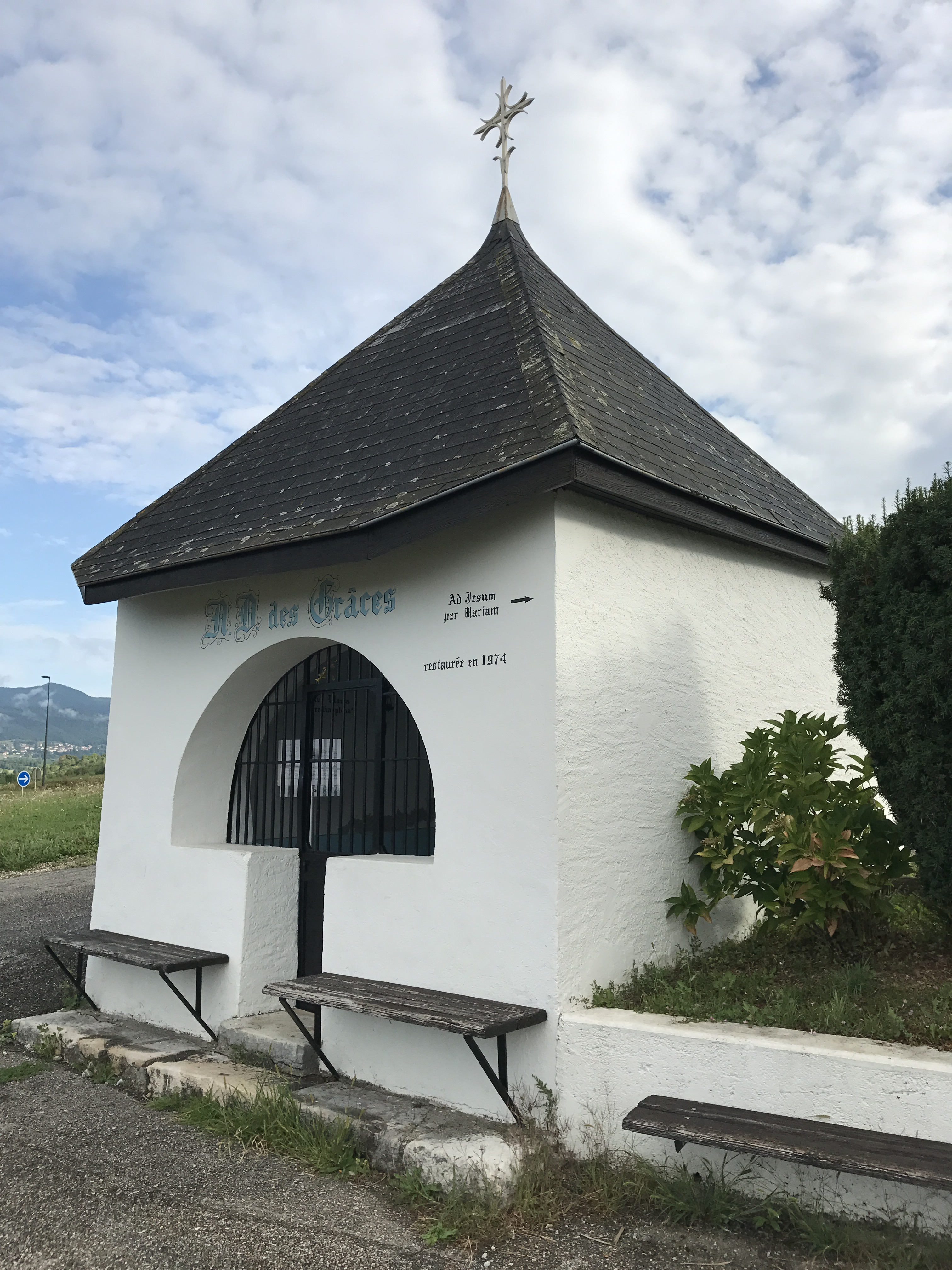 Images de Lancrans, Ain, France.